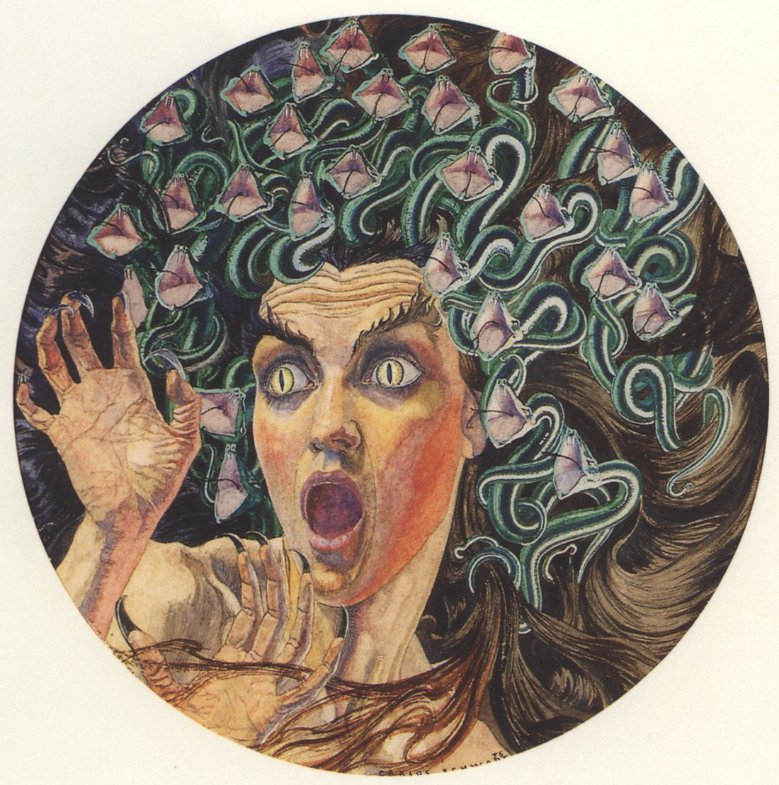 Medusa, 1895. Aquarell auf Papier. Sammlung Hand/Nyeste, Glencoe, USA.